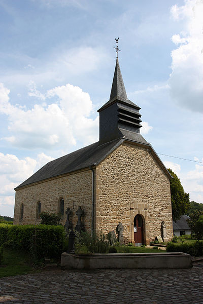 WILLIERS l’Église Saint-Barthélemy .